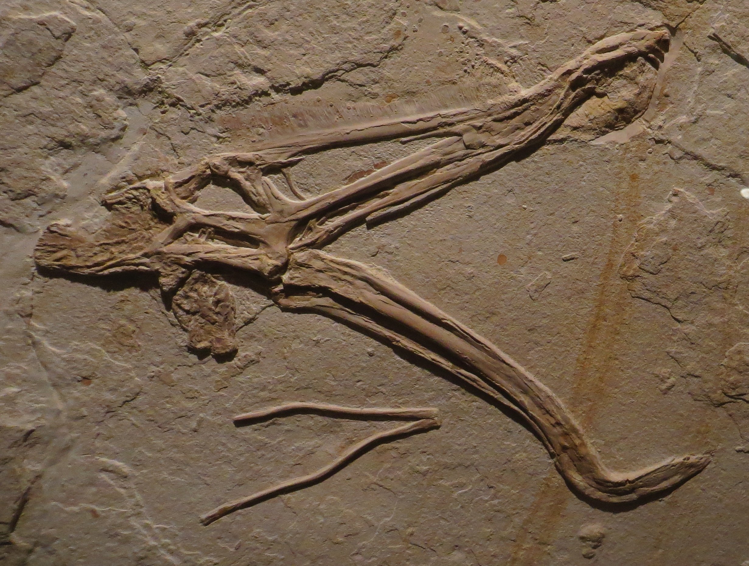 Took the picture at Burgmeister Muller Museum, Solnhofen